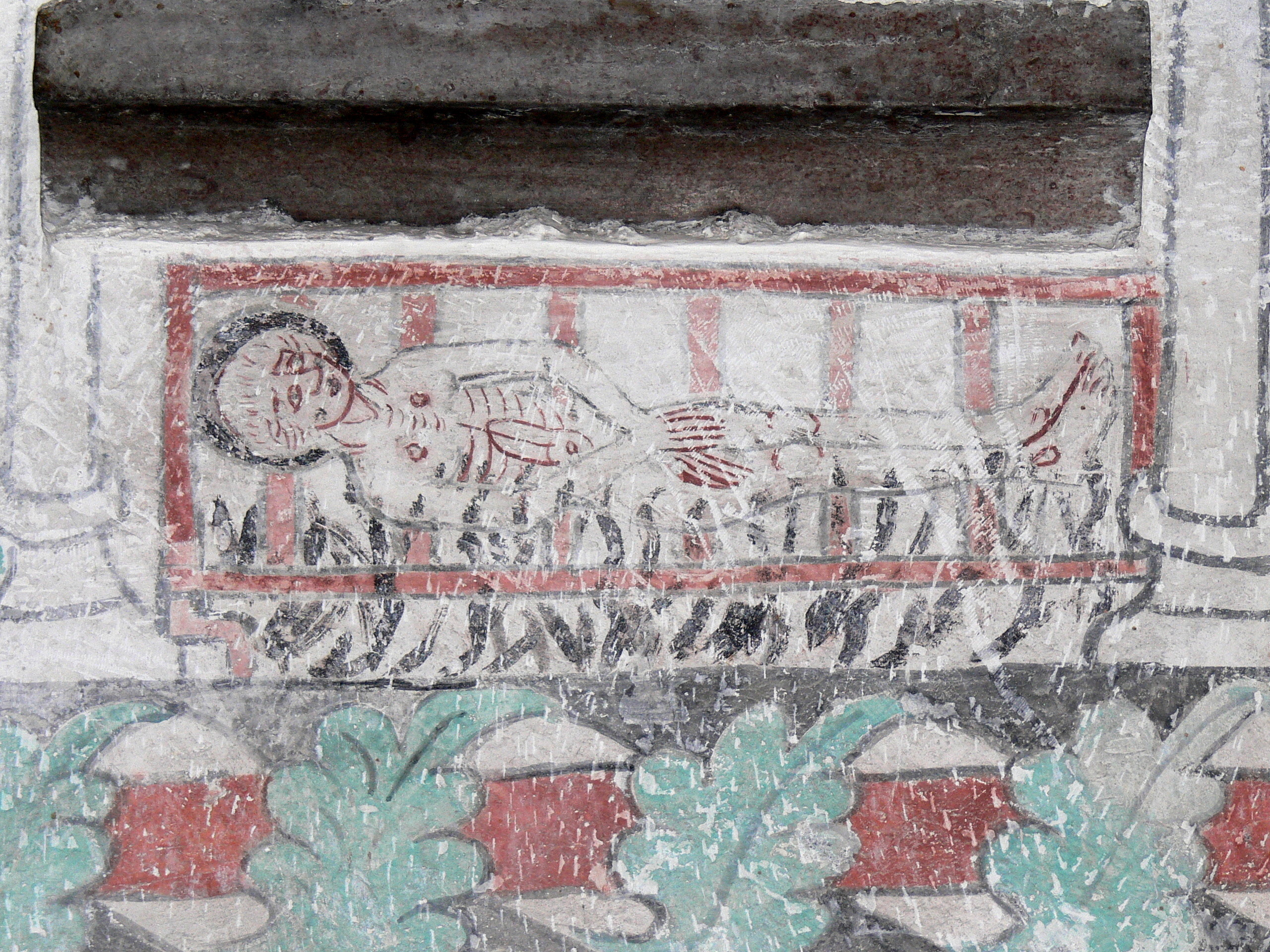 Sundre kyrka auf Gotland. Gotische Wandmalerei: St.Laurentius auf dem Rost